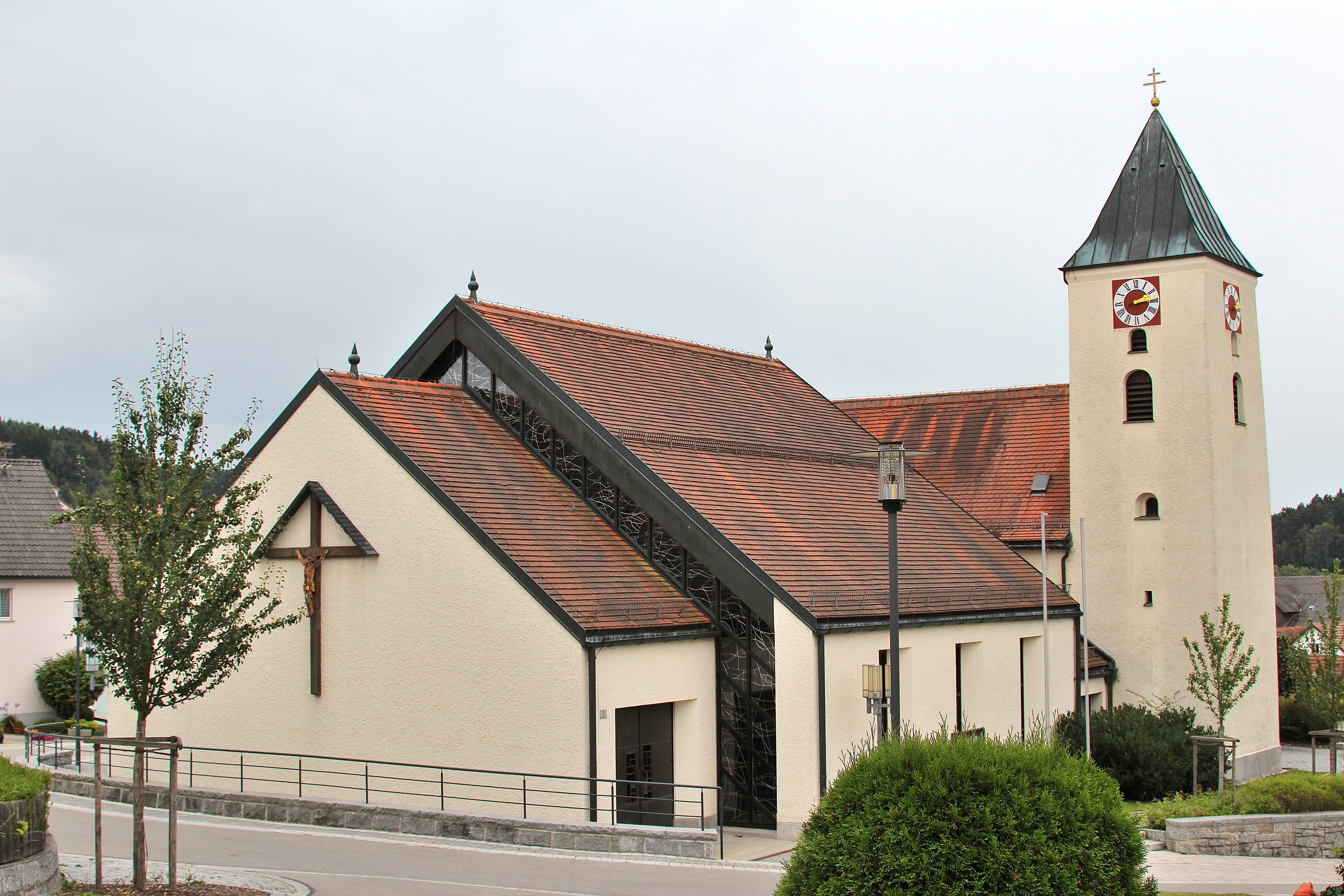 Gleiritsch, Expositurkirche Maria Magdalena: Im Jahre 1286 wird in einem der ältesten Pfarreienverzeichnisse des Bistums Regensburg erstmals die Pfarrei Gleiritsch erwähnt. Der Ursprung des Bauwerks (Turm und Altarraum) reicht in das 13. Jahrhundert zurück. In den Jahren 1927/28 wurden an die beiden Längsseiten Seitenschiffe angebaut. Unter Expositus Alois W. Dirschwigl erfolgte der Erweiterungsbau der Kirche (vom Turm aufwärts nach links). An dieser Stelle rund um das Kirchengebäude war früher der Friedhof von Gleiritsch. Im heutigen Eingangsbereich standen Teile des Anwesens Roth (Schupferer). Das Anwesen Roth wurde abgelöst, die vormaligen Besitzer siedelten in Richtung Seeberg aus. Der Friedhof wurde an den Pfarrweg verlegt. Im Herbst 1977 begann die Baufirma Köppl aus Lampenricht mit den Bauarbeiten am neuen Gotteshaus. Am 2. Juli 1978 konnte Domkapitular Prälat Franz Spießl den Grundstein für den Kirchenerweiterungsbau legen. Den krönenden Abschluss des Kirchenbaus bildete die Konsekration durch Weihbischof Karl Flügel am 21. Juli 1979. Er bezeichnete den Bau als eine "glückliche Verbindung des Alten mit dem Neuen".